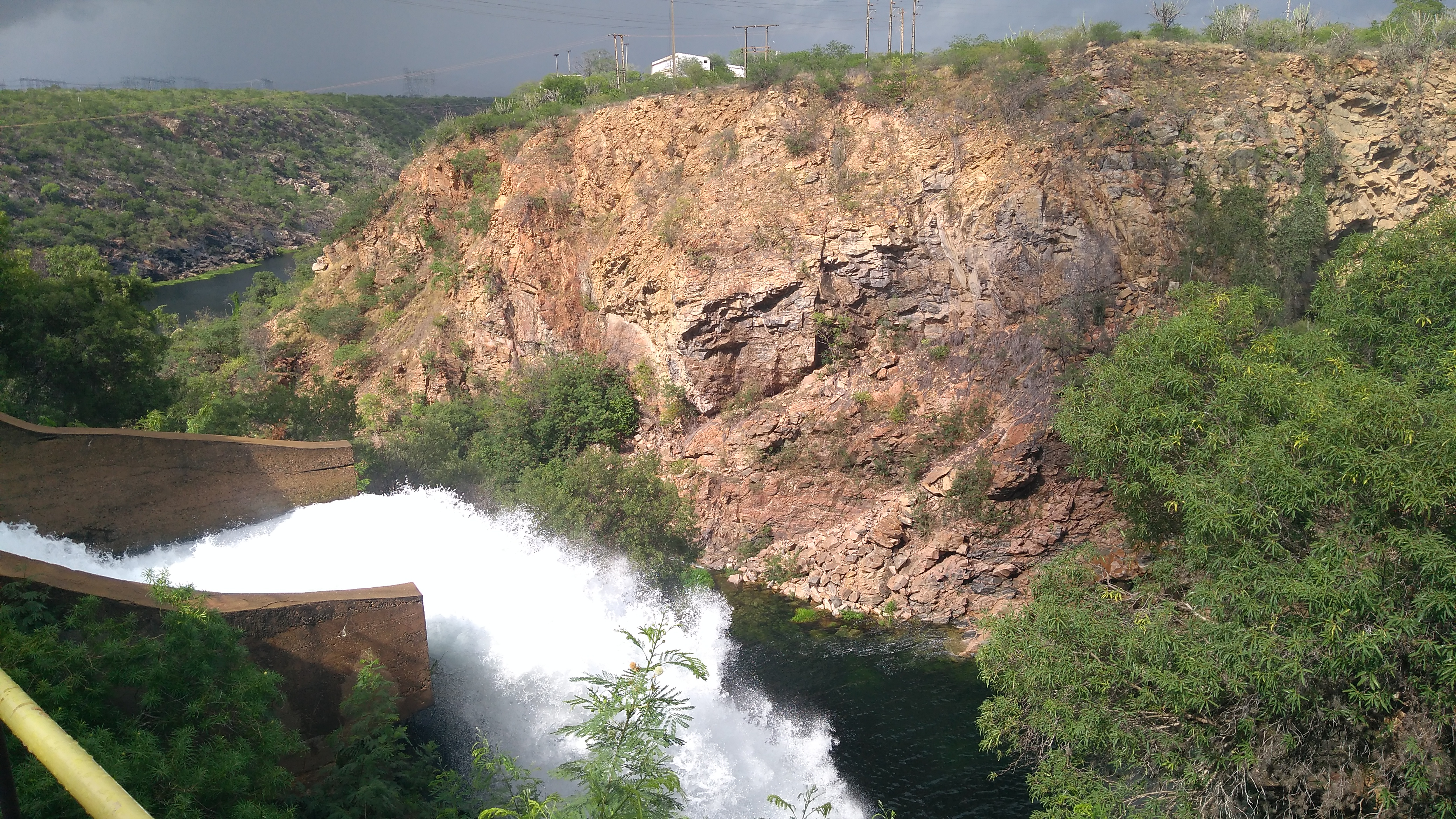 A interação em um imagem de homem/natureza, exposta no avanço da civilização em comparação a eras passadas.